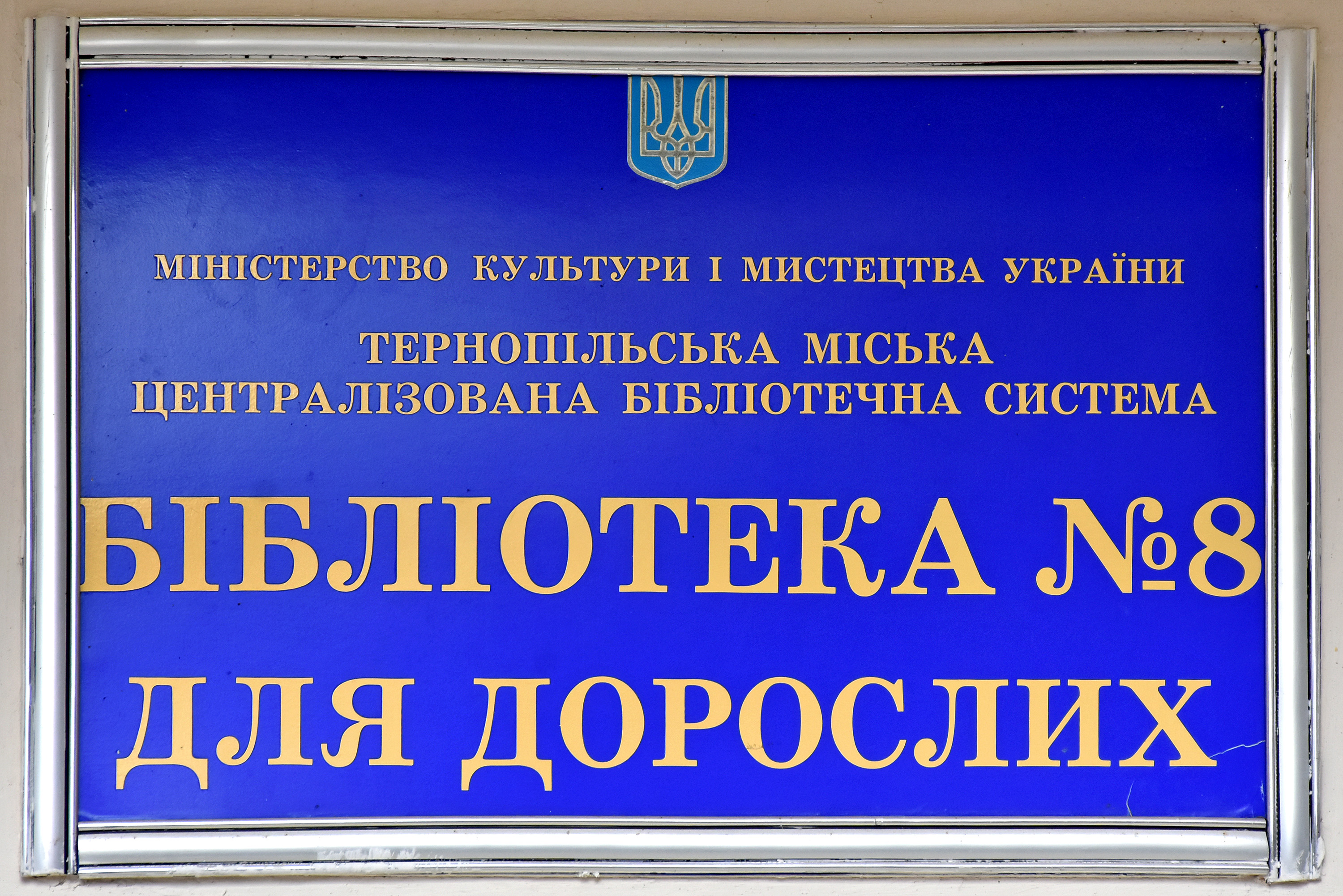 Бібліотека № 8 для дорослих Тернопільської міської централізованої бібліотечної системи.